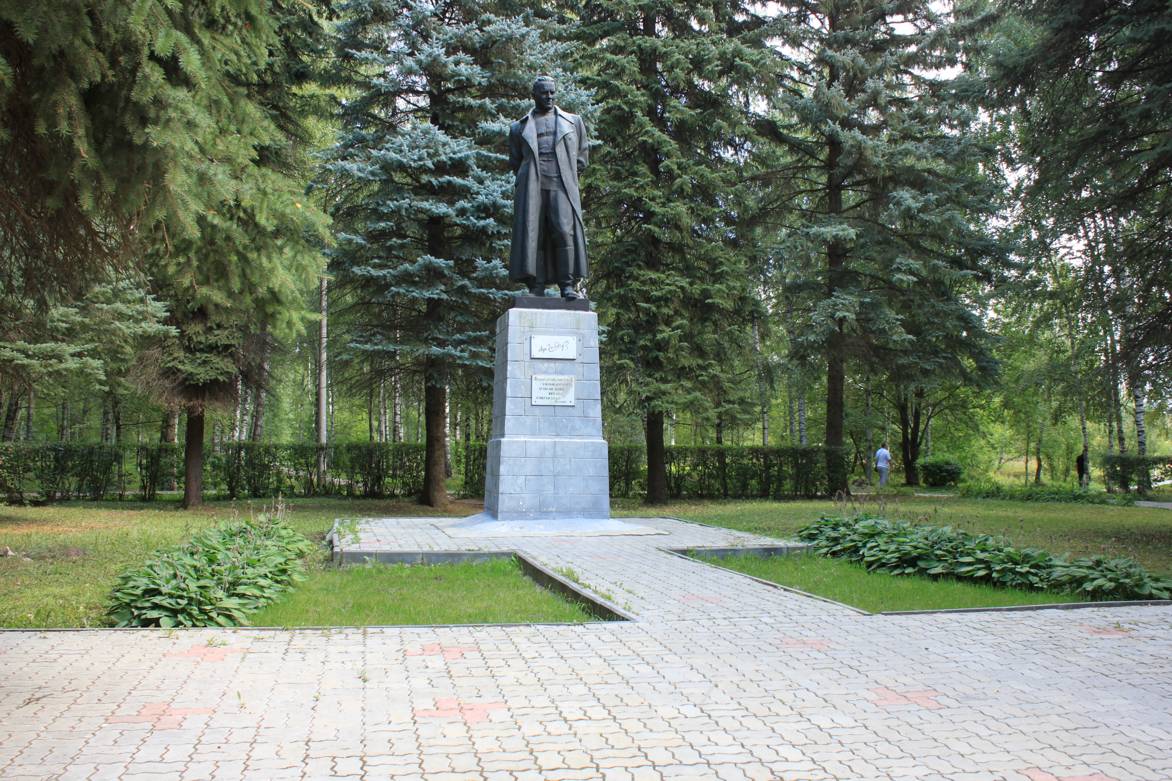 Памятник в одноимёном парке города Арзамаса